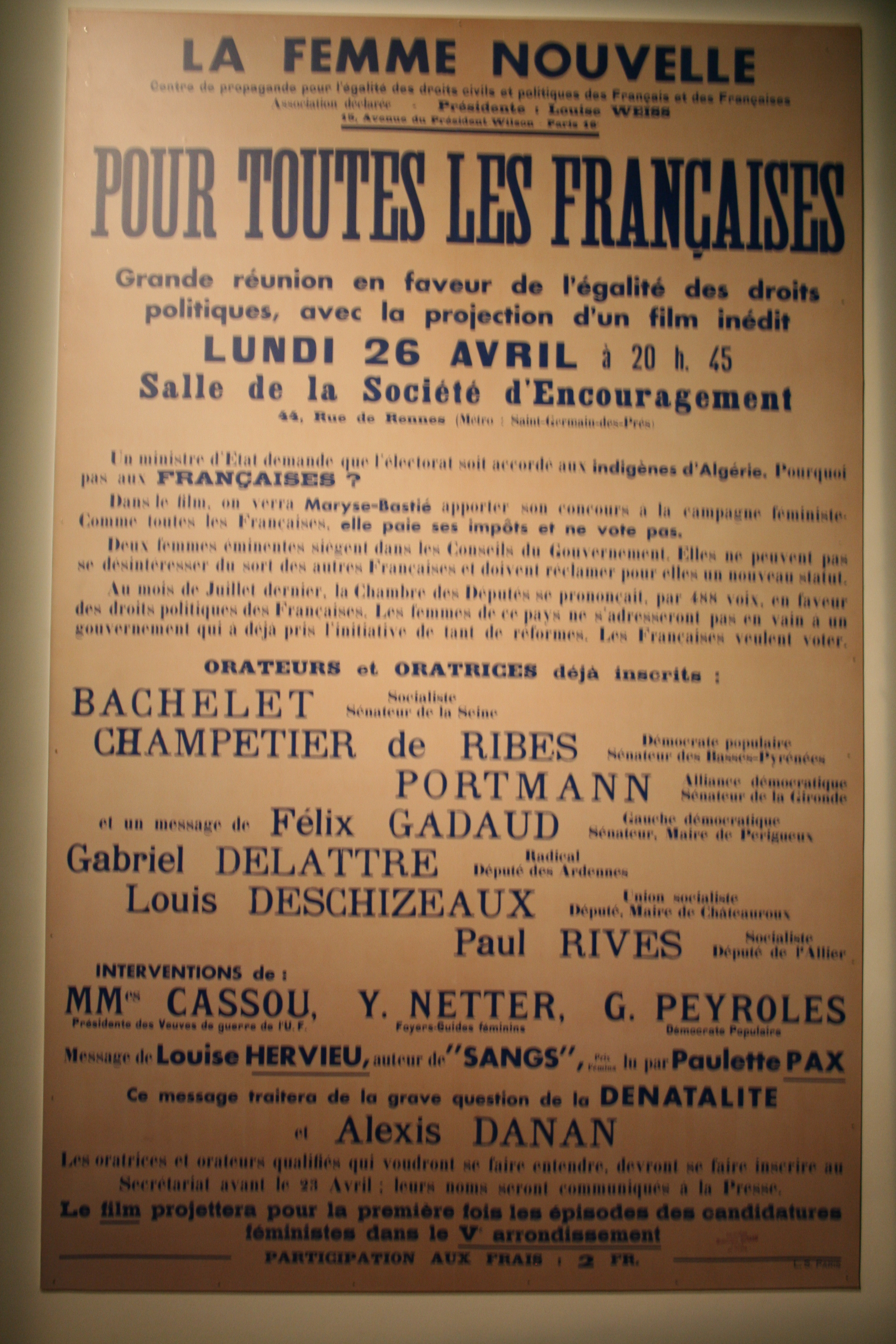 affiche La Femme Nouvelle au musée de Saverne (donation Louise Weiss) Affiche pour une réunion organisée le lundi 26 avril, Salle de la Société d’Encouragement [Société d'Encouragement pour l'Industrie Nationale], 44 rue de Rennes (Paris VIe arrdt., devenu depuis n° 4 Place Saint-Germain-des-Prés). Sont cités: Louise Weiss (1893-1983), fondatrice et présidente de l’association La Femme Nouvelle, Centre de propagande pour l’égalité des droits civils et politique des Français et des Françaises, 15 Avenue du Président Wilson; Maryse Bastié, aviatrice; Alexandre Bachelet (1866-1945), sénateur de la Seine (1927-1944); Auguste Champetier de Ribes (1882-1947), démocrate populaire, sénateur des Basses-Pyrenées (1924-1934); Georges Portmann (1890-1985), alliance démocratique, sénateur de la Gironde (1933-1941; 1955-1971); Félix Gadaud, Gauche démocratique, sénateur de la Dordogne (1929-1945), Maire de Périgueux (1925-1943); Gabriel Delattre, radical, député des Ardennes; Louis Deschizeaux, Union socialiste, député, Maire de Châteauroux (1925-1942 ; 1959-1967); Paul Rives, nationaliste, député de l’Allier (à partir de 1932); Louise Hervieu (1978-1954), auteur de Sangs, prix Fémina (1936) - cette dernière date permet de déduire l'année de la réunion.